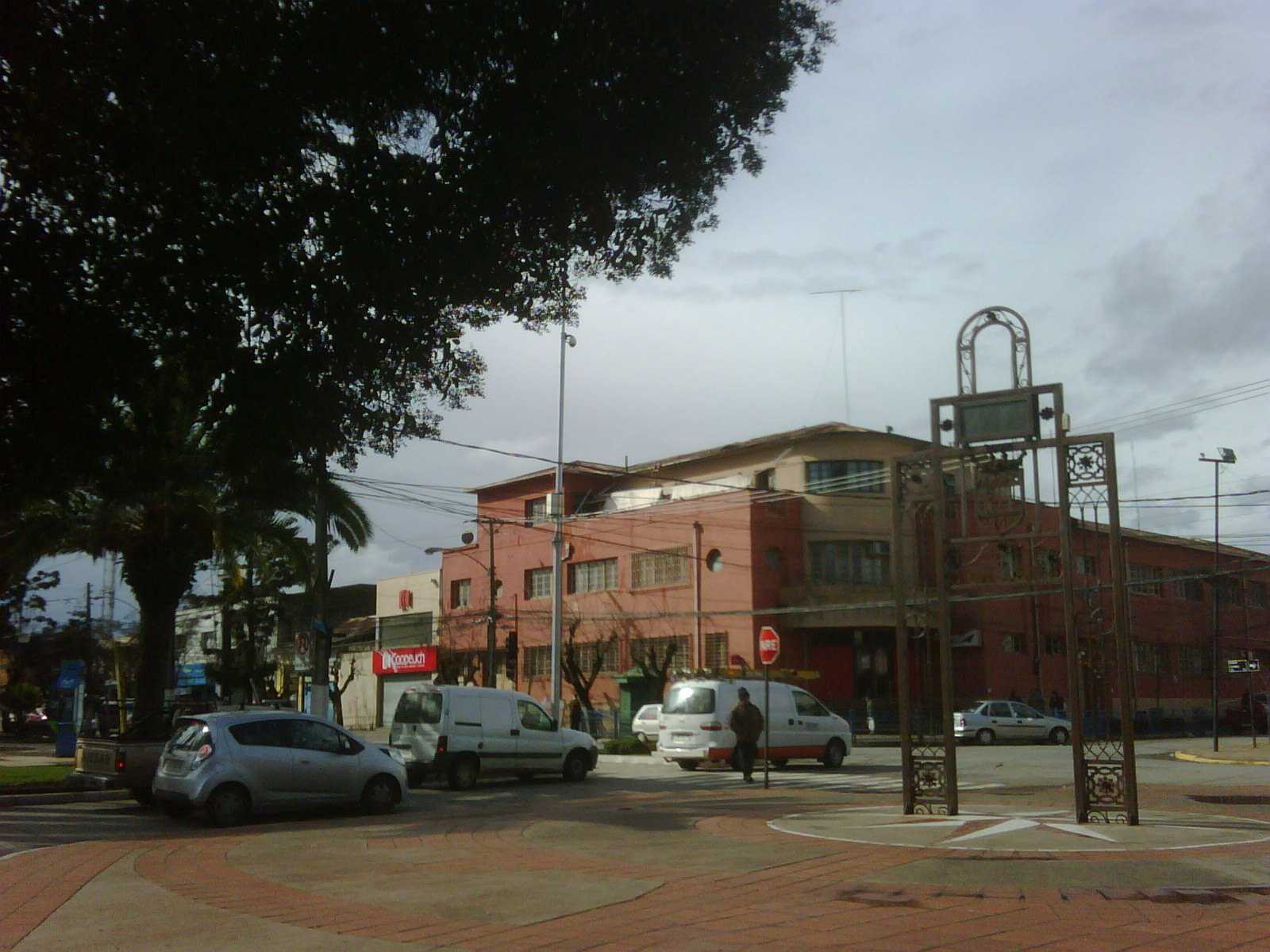 Vista del edificio de Correos de Chile.